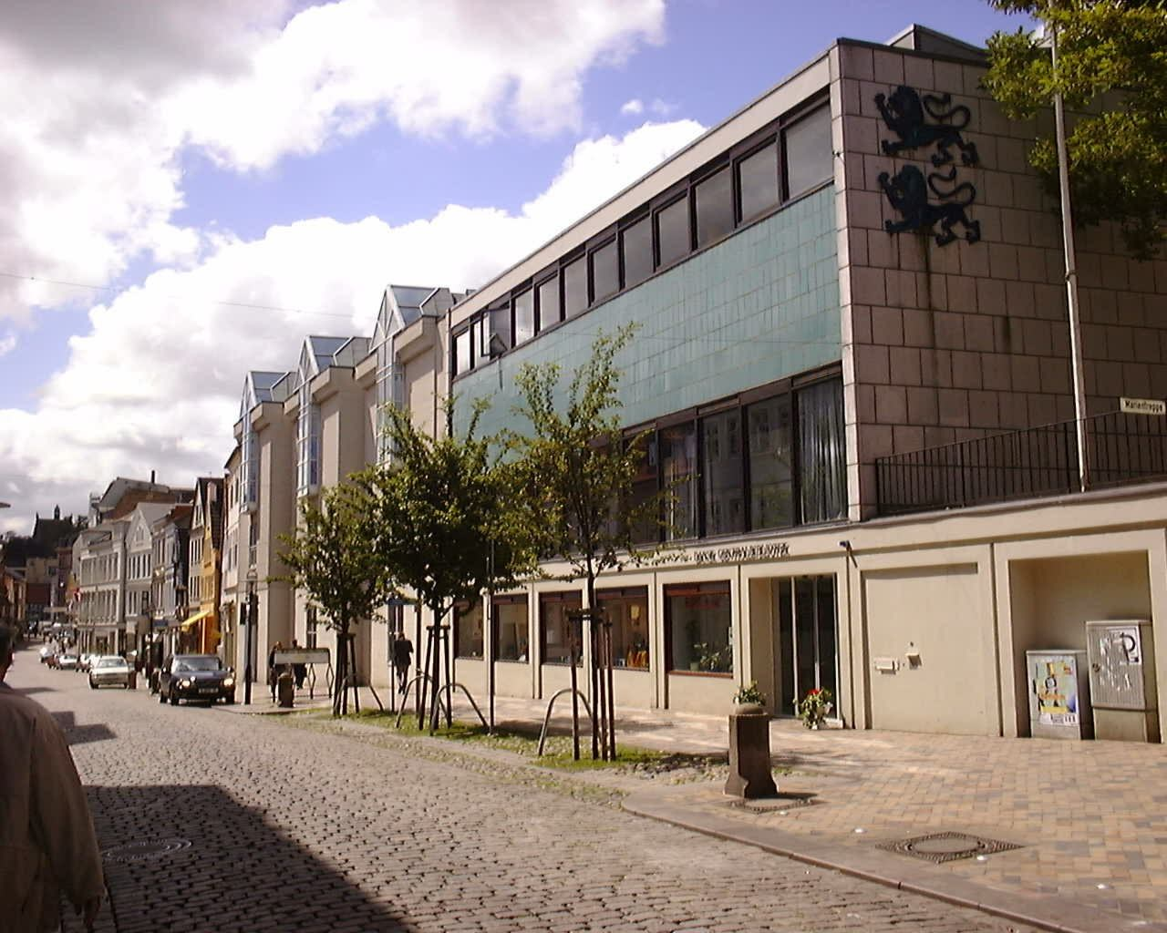 Die Dänische Zentralbibliothek für Südschleswig in Flensburg, Sommer 2000